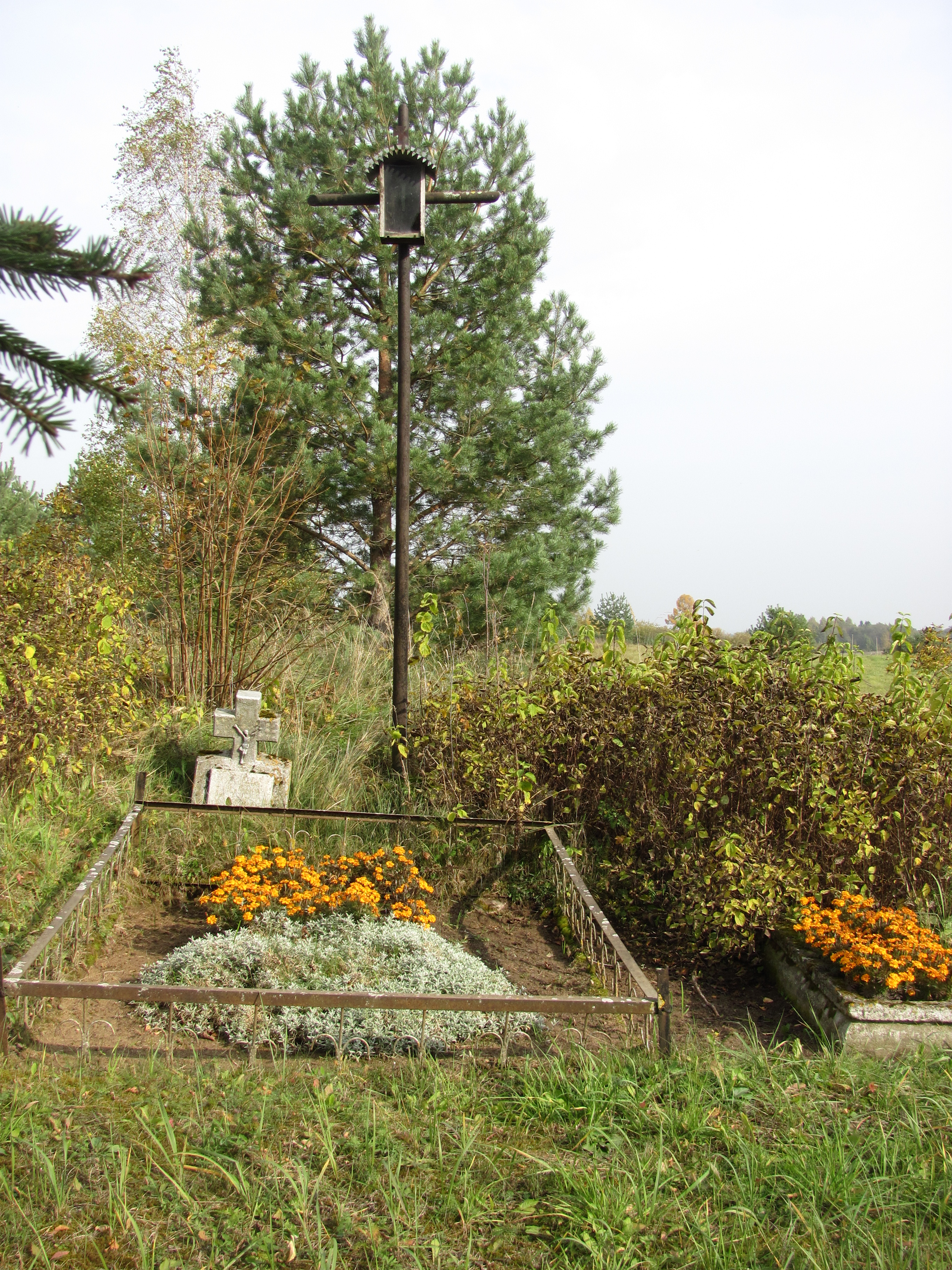 Pilkėnai, Lithuania